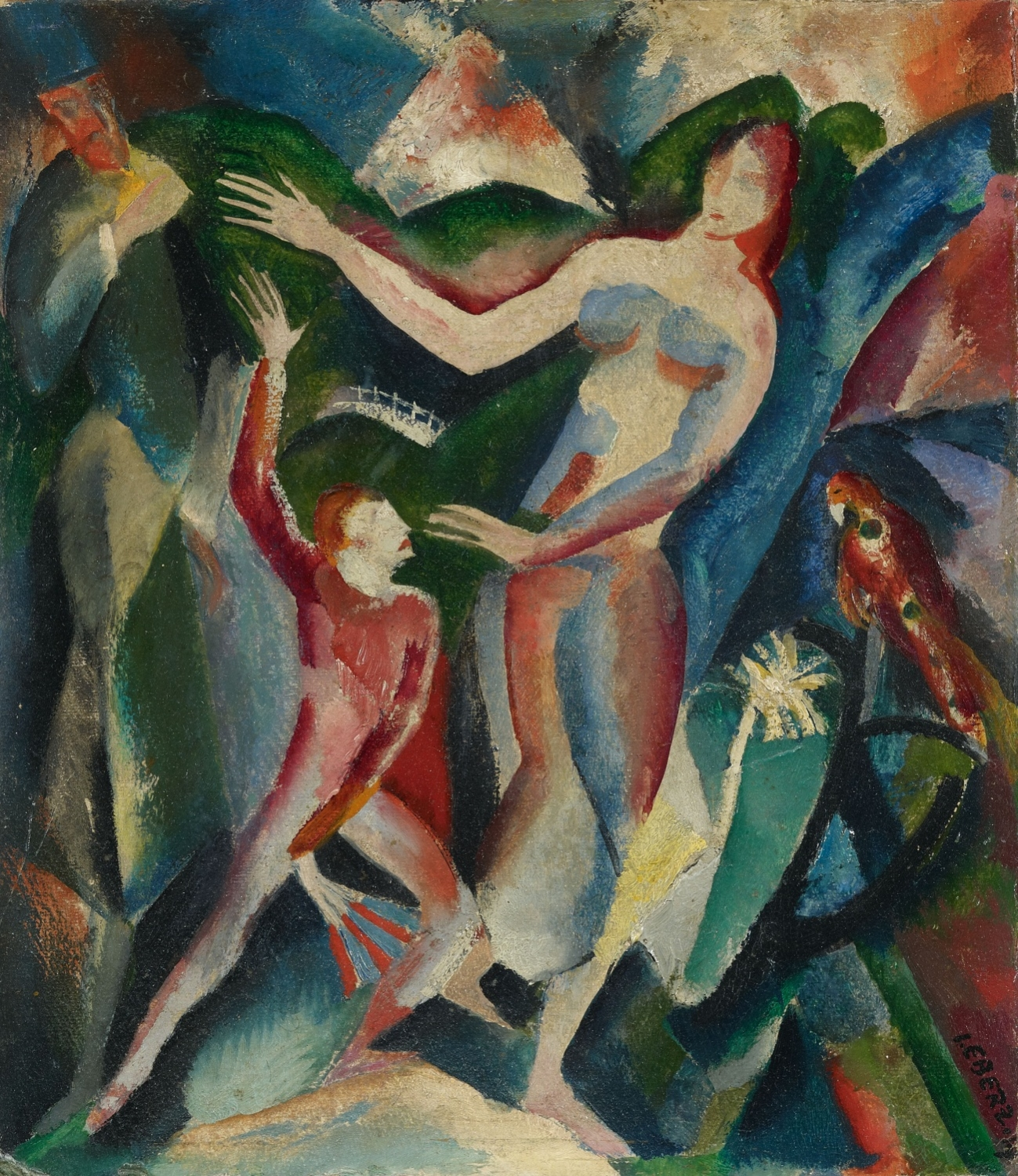 Der exotische Tanz . Öl auf Malpappe 34.7 x 30.2 cm